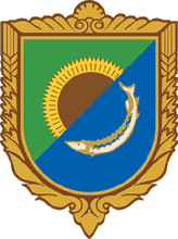 Герб Приазовського району